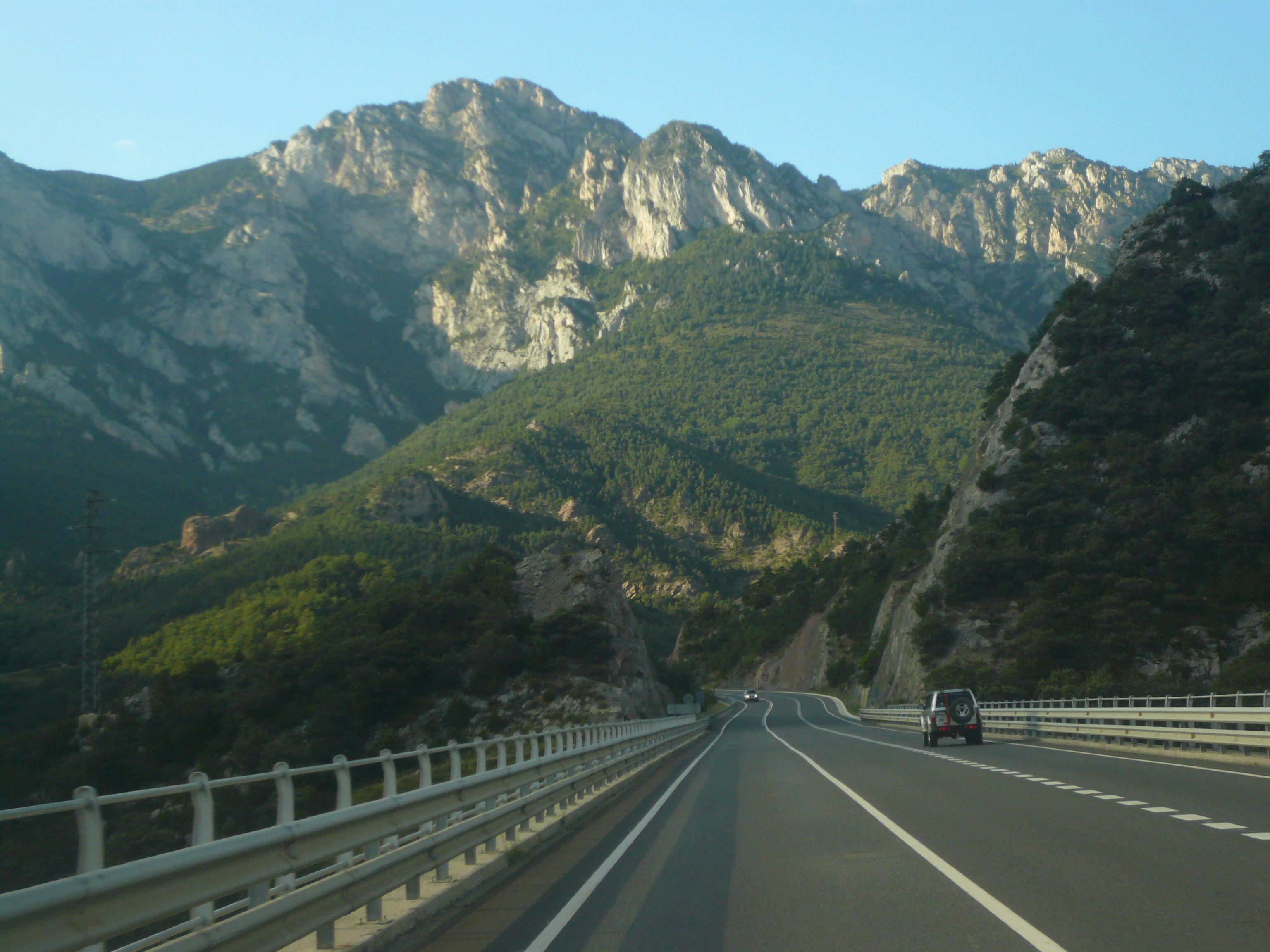 Penyes Altes de Moixeró (Berguedà) (Guardiola de Berguedà). Serra de Moixeró. This is a a photo of an emblematic summit in Catalonia, Spain, with id: CE-281082006 Object location42° 18′ 22.64″ N, 1° 50′ 32.87″ E